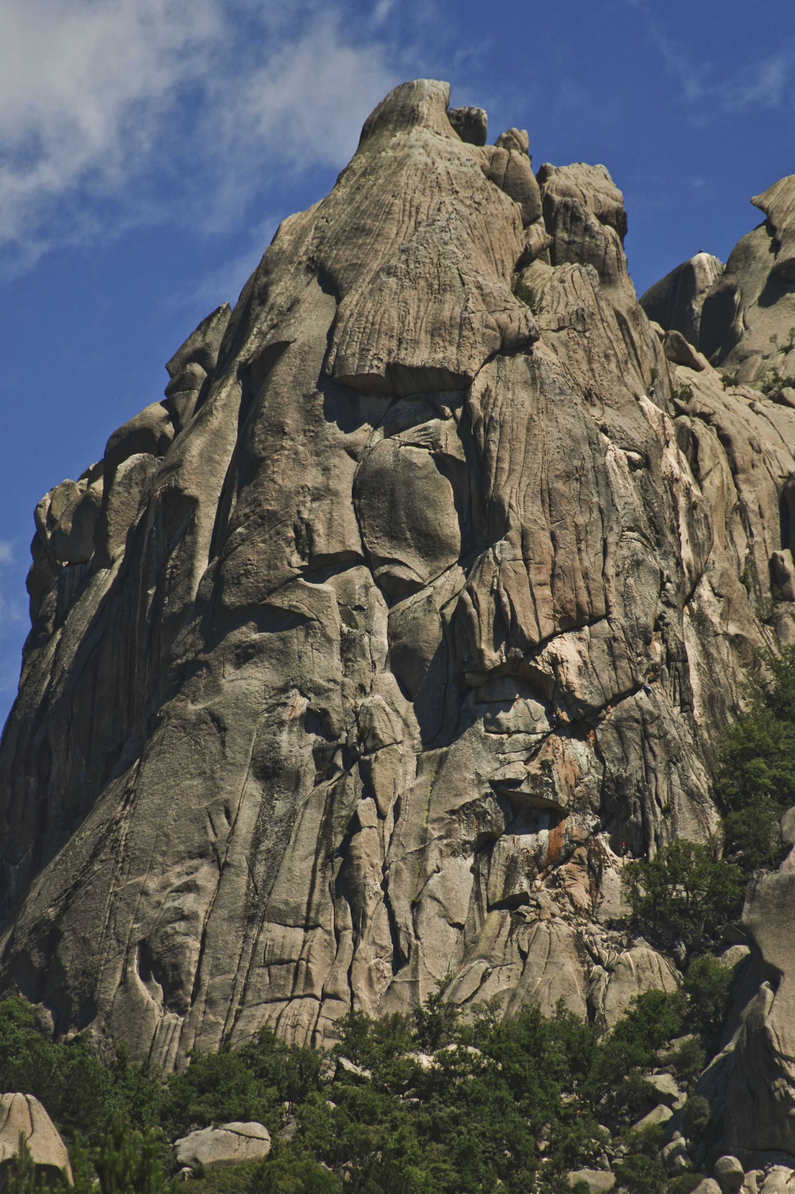 Risco emblemático de La Pedriza del Manzanares